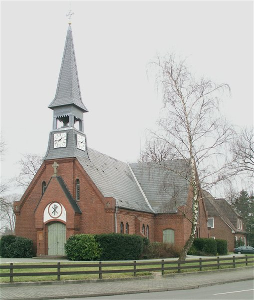 Kirche von Hennstedt im Kreis Steinburg -- Church of Hennstedt (Steinburg), Germany